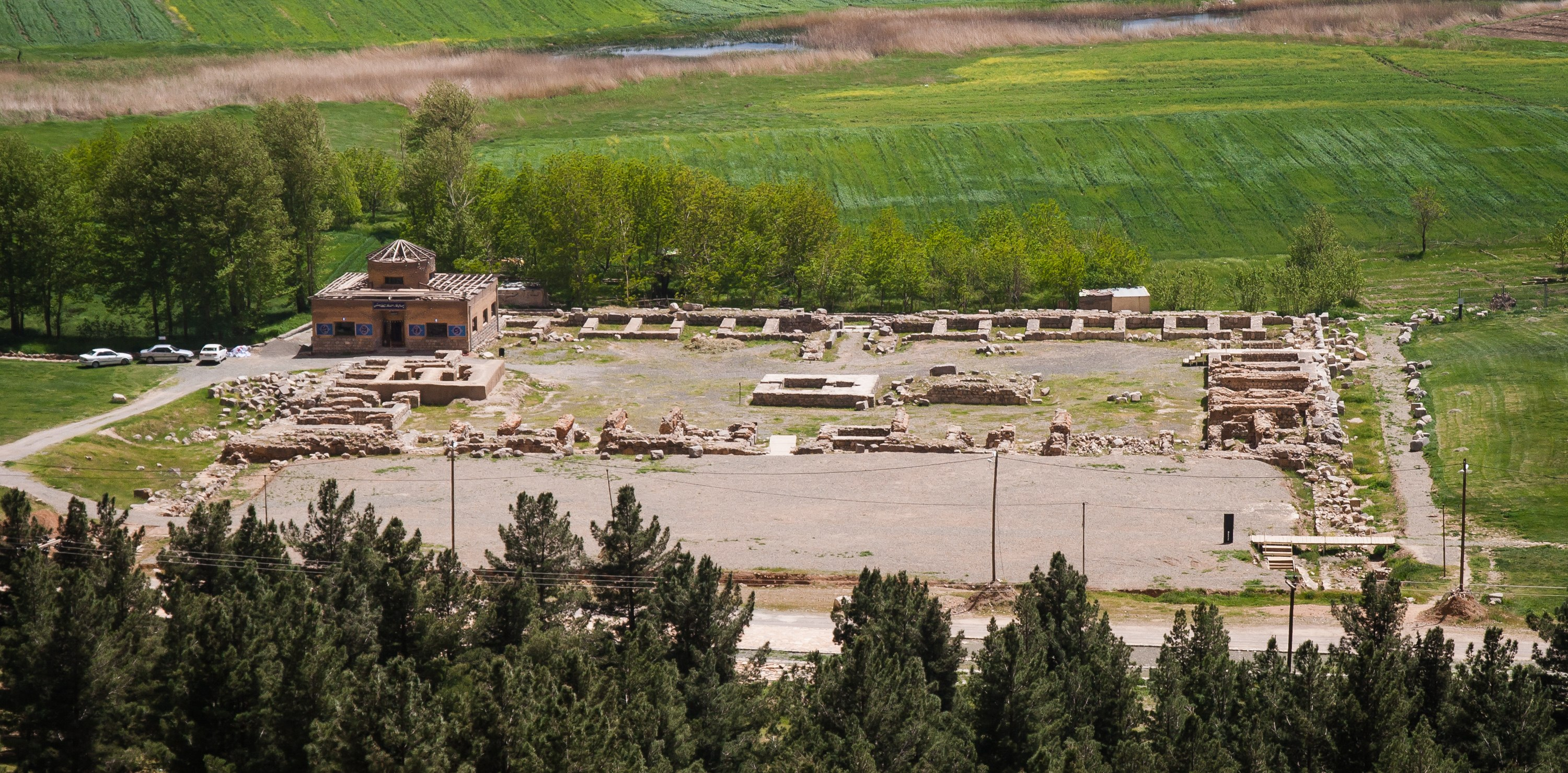 کاروانسرای ایلخانی در بیستون کرمانشاه